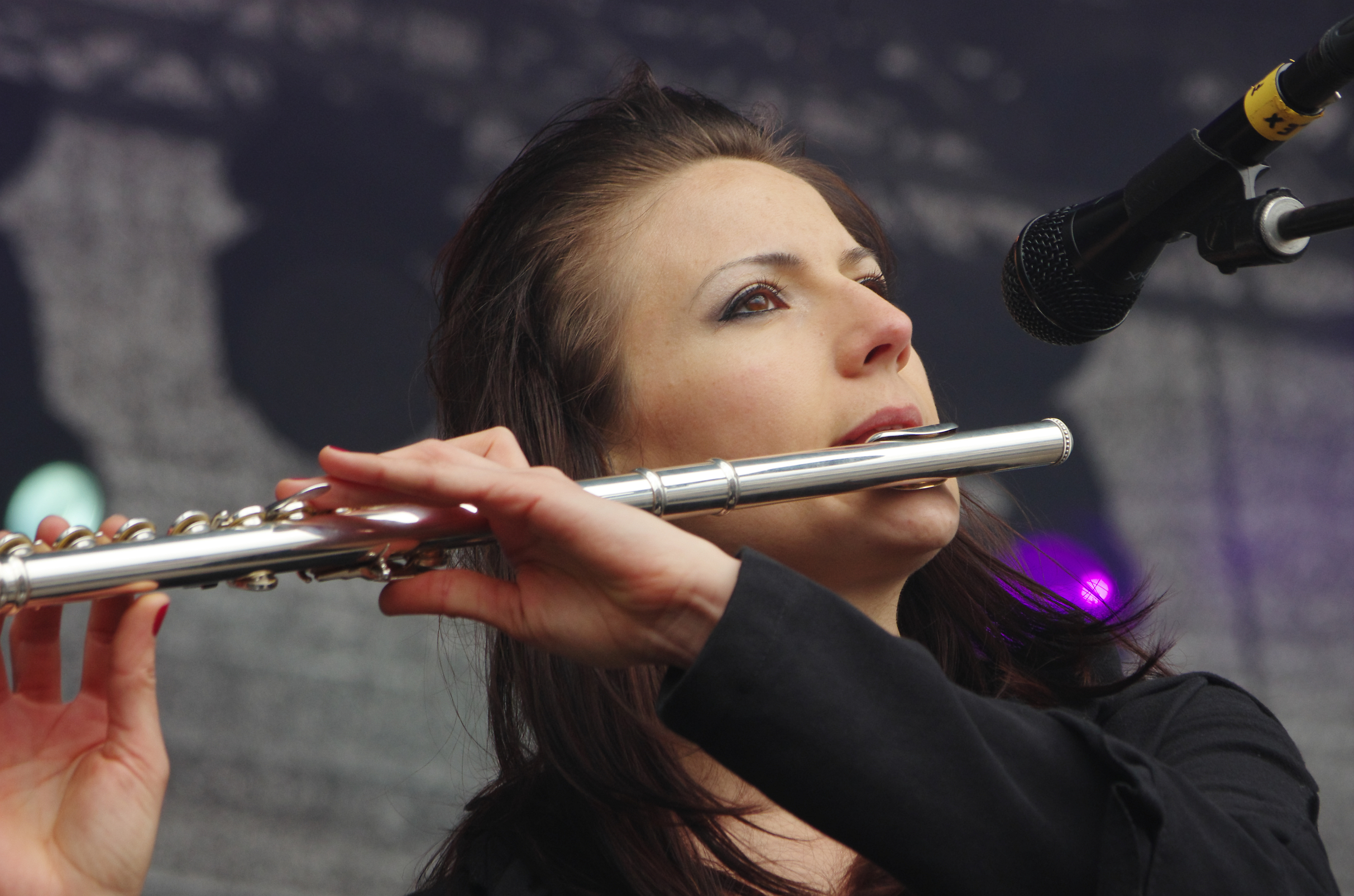 Honigdieb, Rock in den Ruinen 2013 in Dortmund. Alex Chernitsyna (Querflöte, Melodica, Gesang)